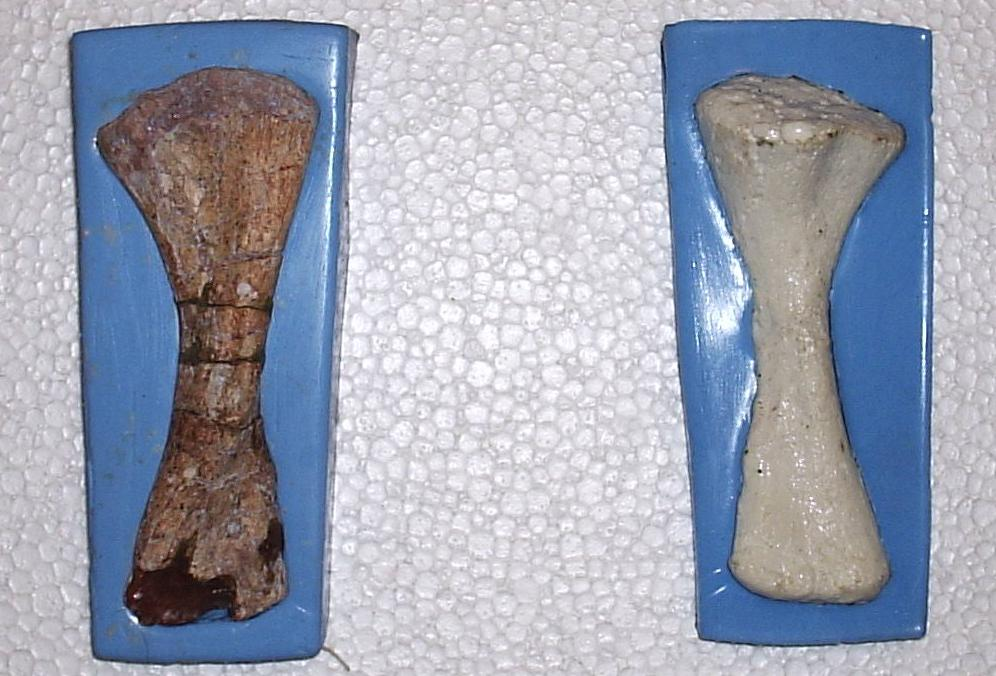 Molde de osso de um rincossauro.